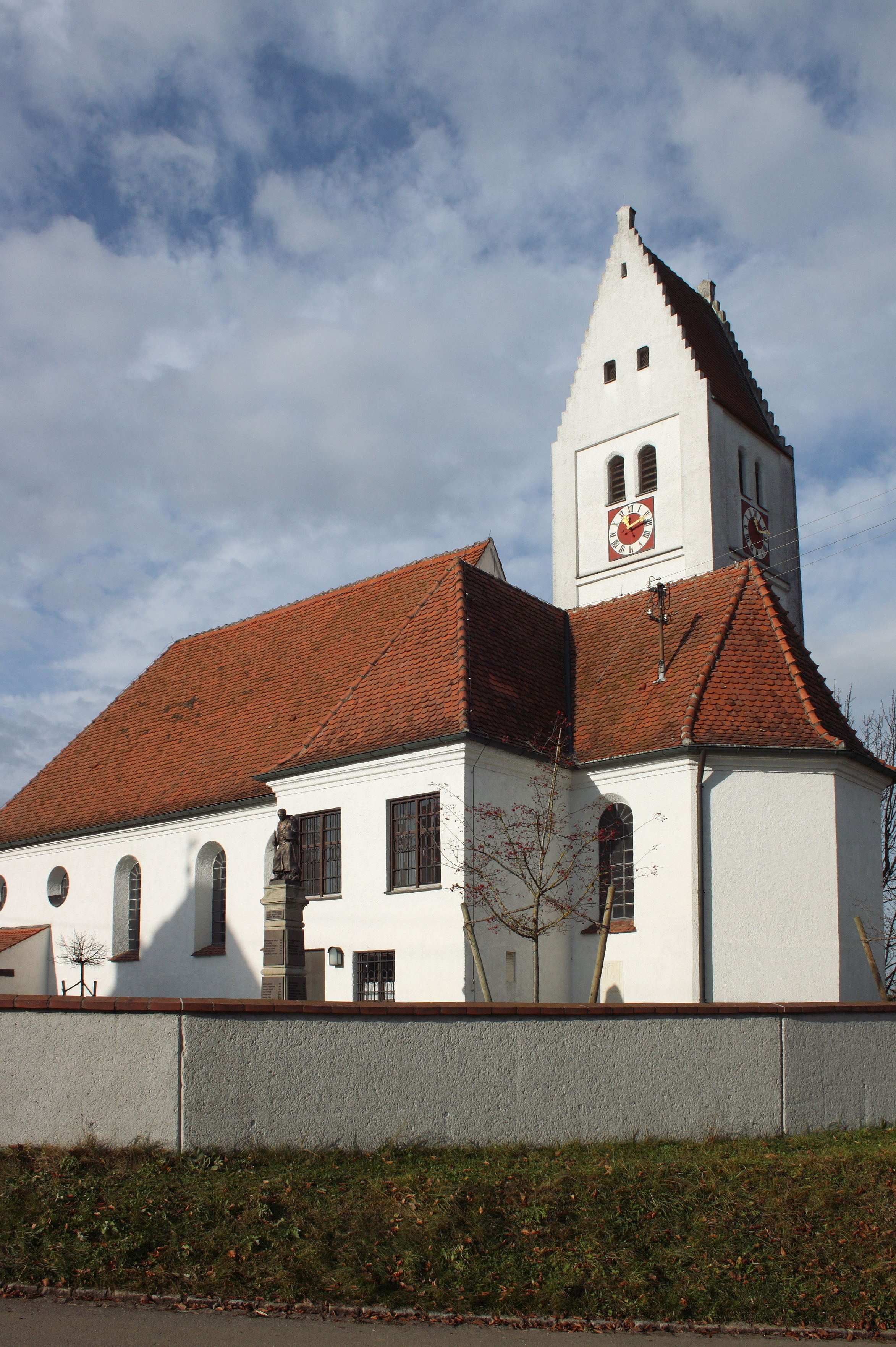 Katholische Pfarrkirche St. Peter und Paul in Hafenhofen, einem Ortsteil von Haldenwang im Landkreis Günzburg (Bayern), Ansicht von Südosten